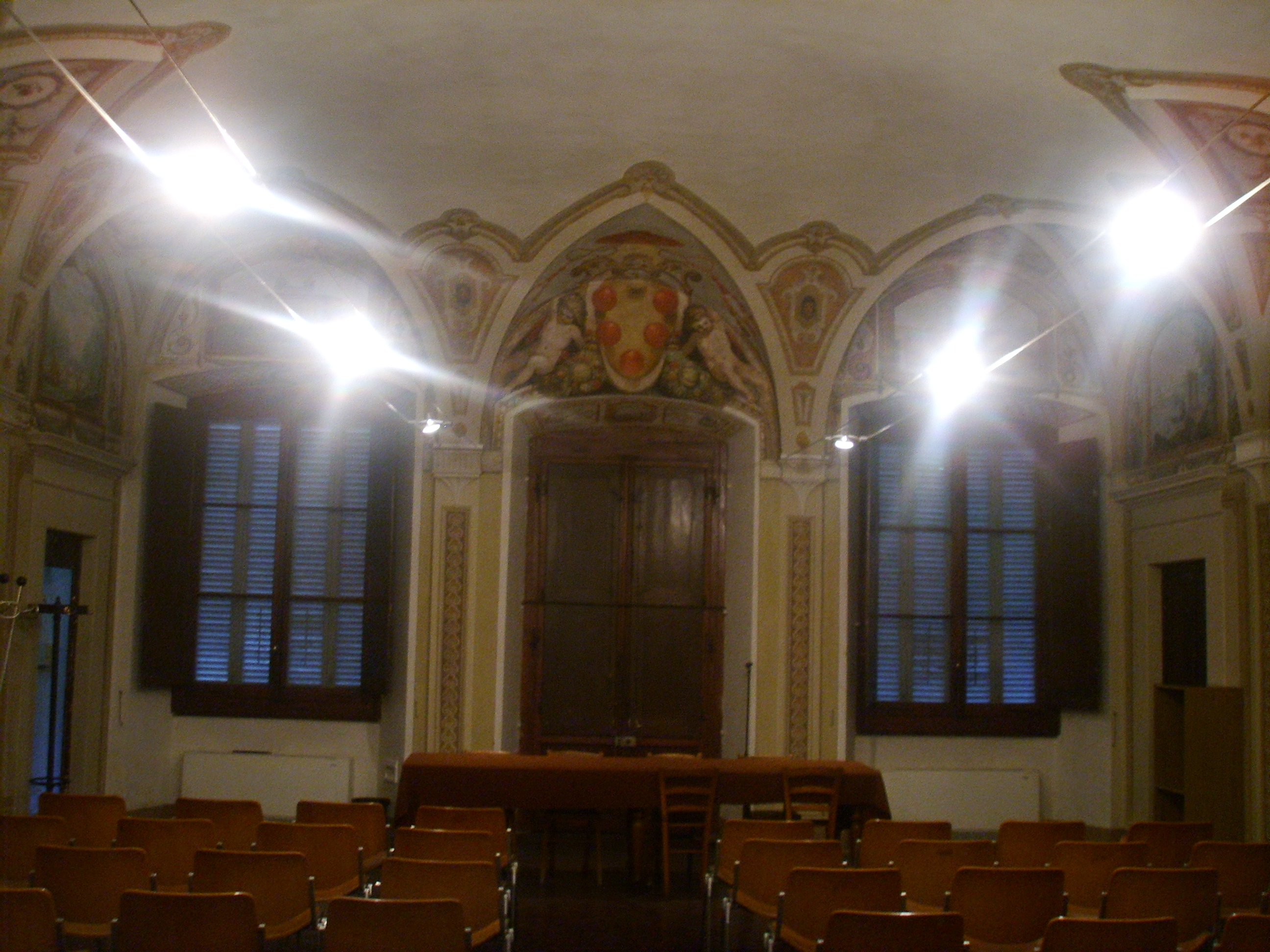 Villa di Careggi in Florence, Italy